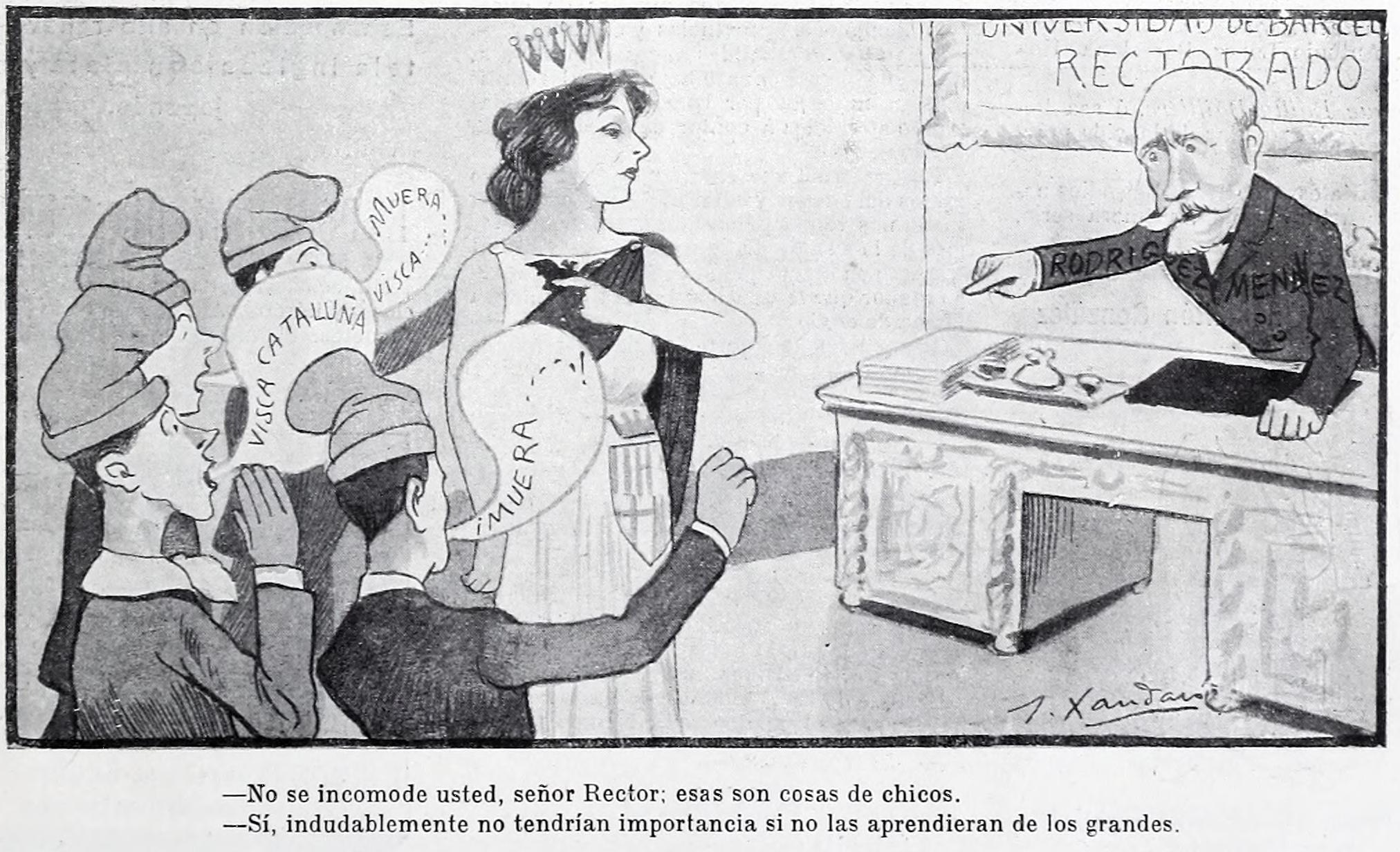 Actualidades